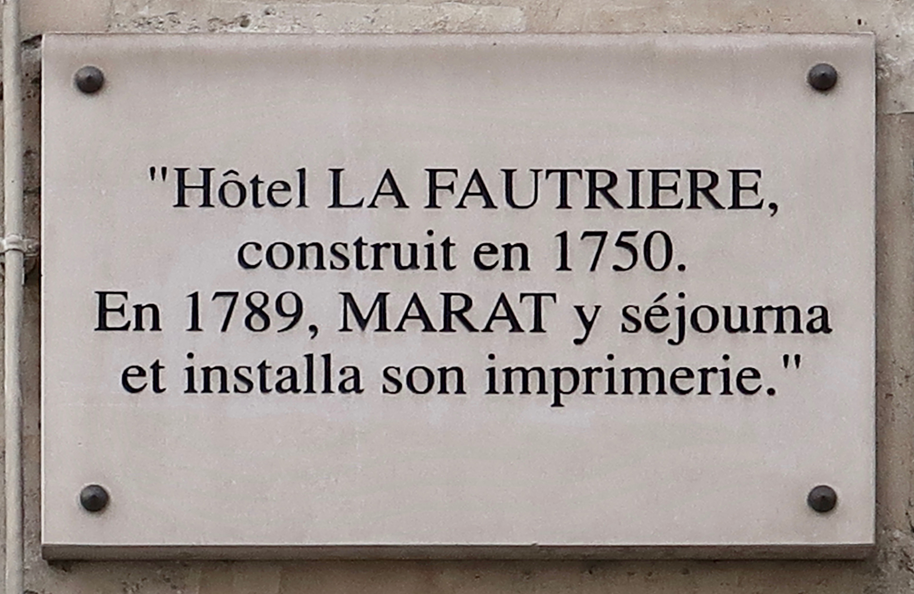 Plaque devant l'hôtel La Fautrière, où séjourna Jean-Paul Marat, 16 rue de l'Ancienne-Comédie (Paris, 6e).